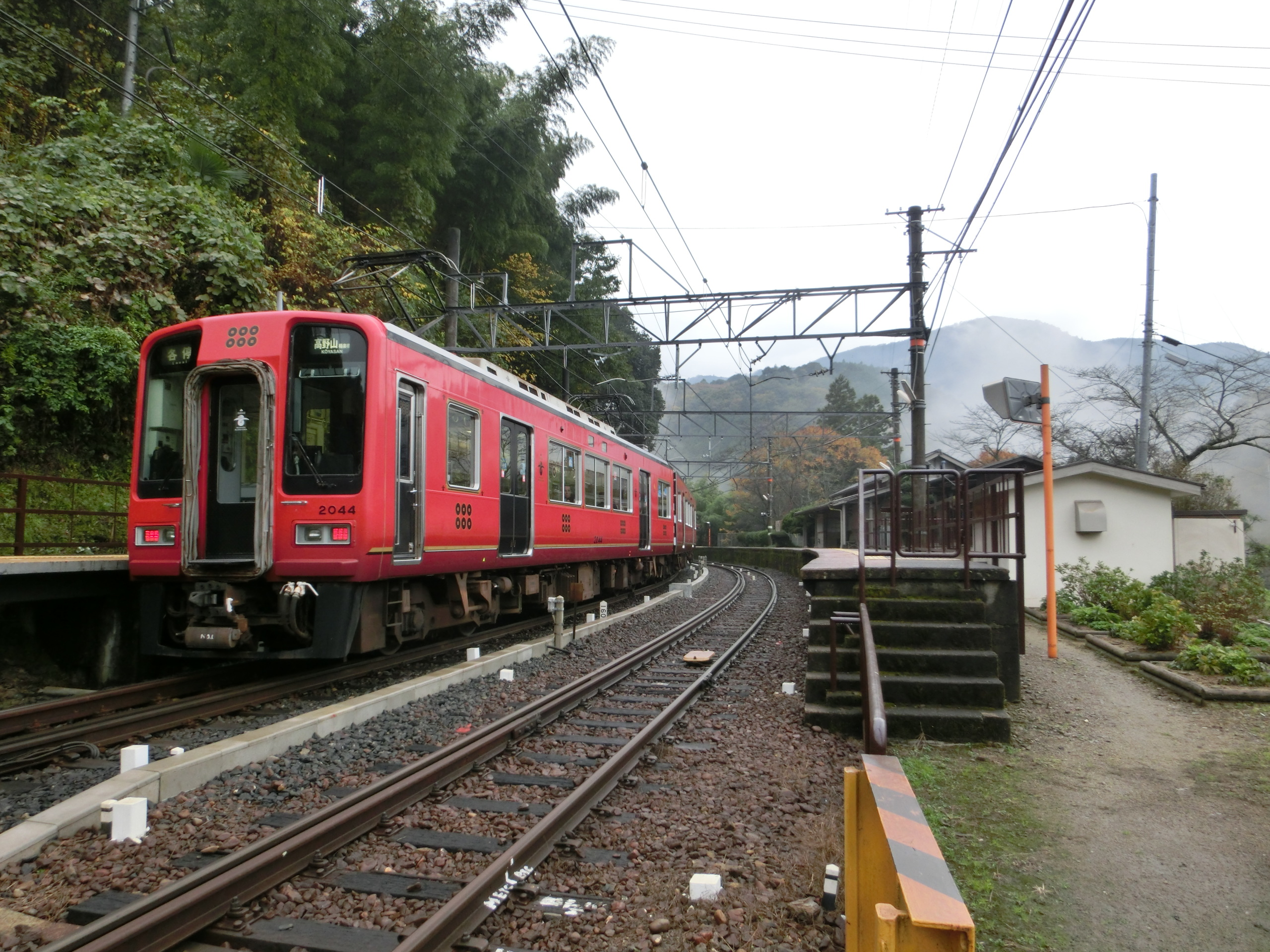 下古沢駅上下ホーム（難波方）